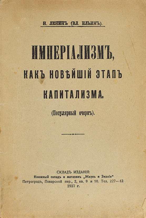 Титульная страница первого издания труда В. И. Ленин «Империализм, как высшая стадия капитализма», вышедшего в Петрограде в 1917 году.